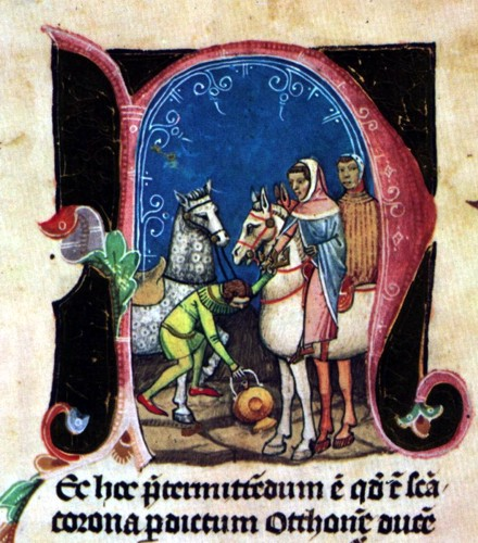 Ottó és a magyar szentkorona. Otto and the Hungarian Holy Crown.